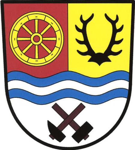 znak, Úherce, okres Plzeň-sever